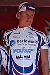 Vladimir Efimkin. Team Barloworld-Valsir, Euskal Bizikleta 2005